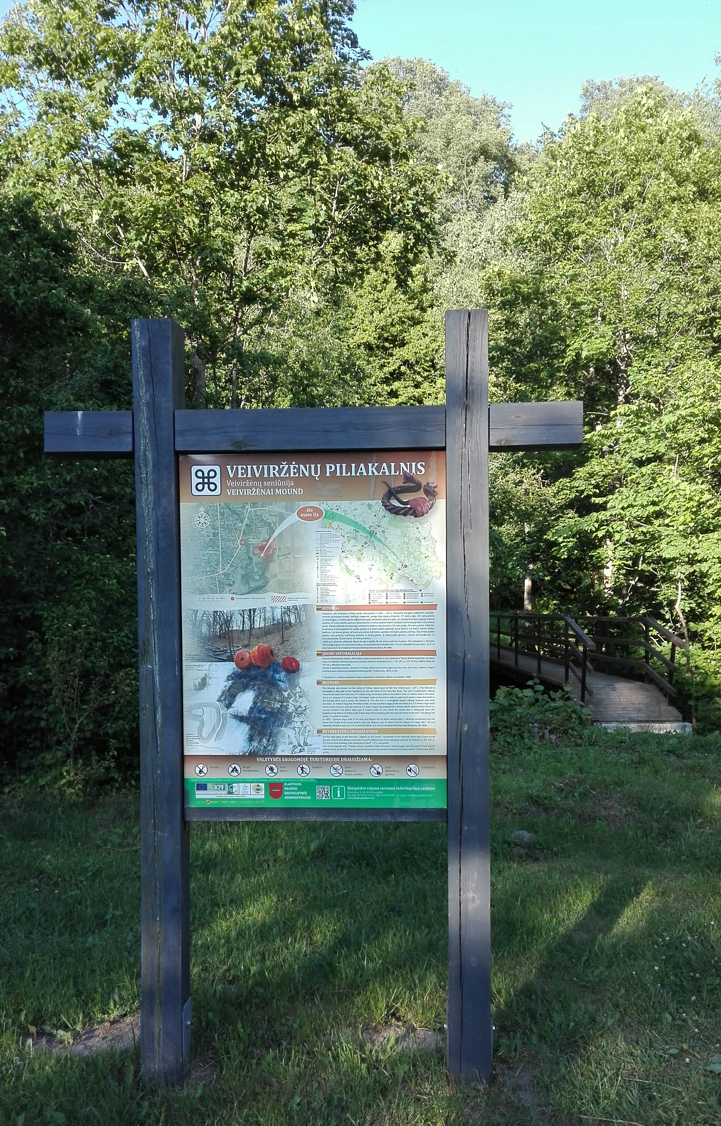 Informacinis stendas apie Veiviržėnų piliakalnį